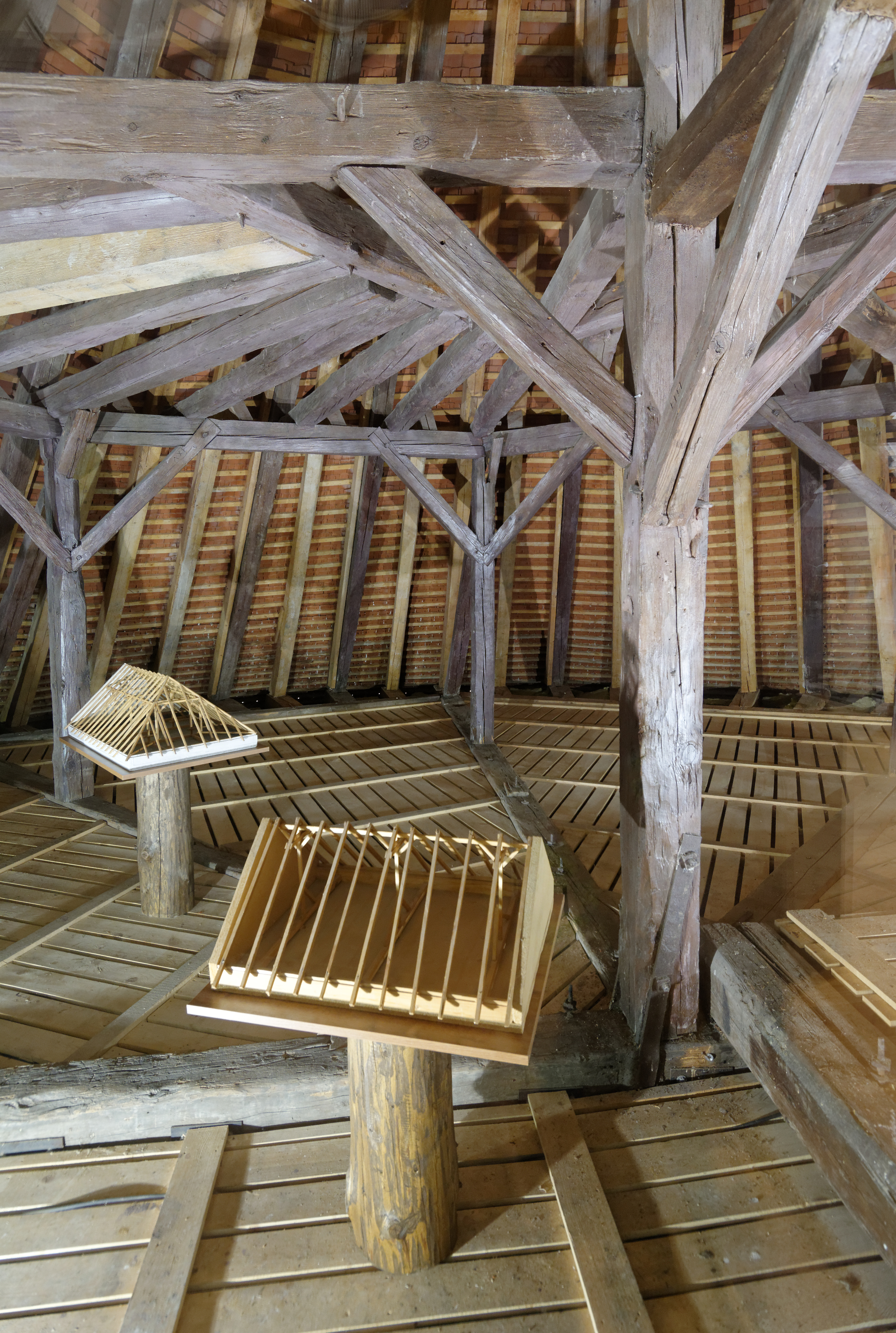 Muzeum v Litovli, pohled do expozice.